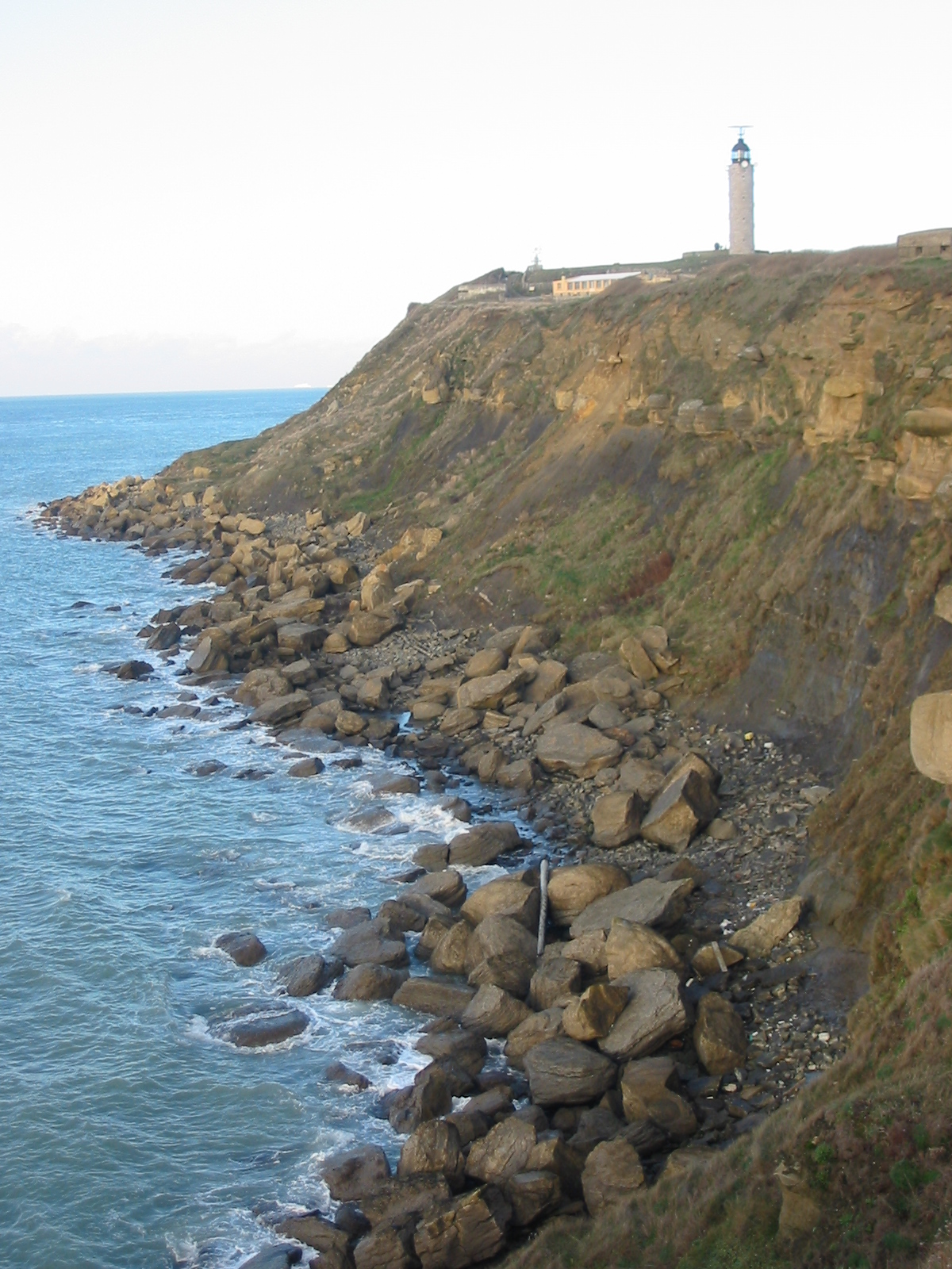 Cape_Gris_Nez,_France